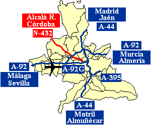 Comunicaciones del Área Metropolitana de Granada, en España.